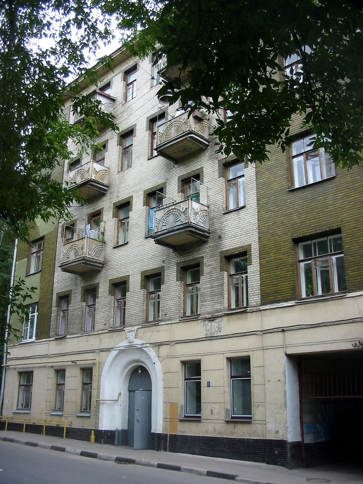 Rationalist Moderne (late Art Nouveau) building. 7 Tokmakov Lane, Moscow